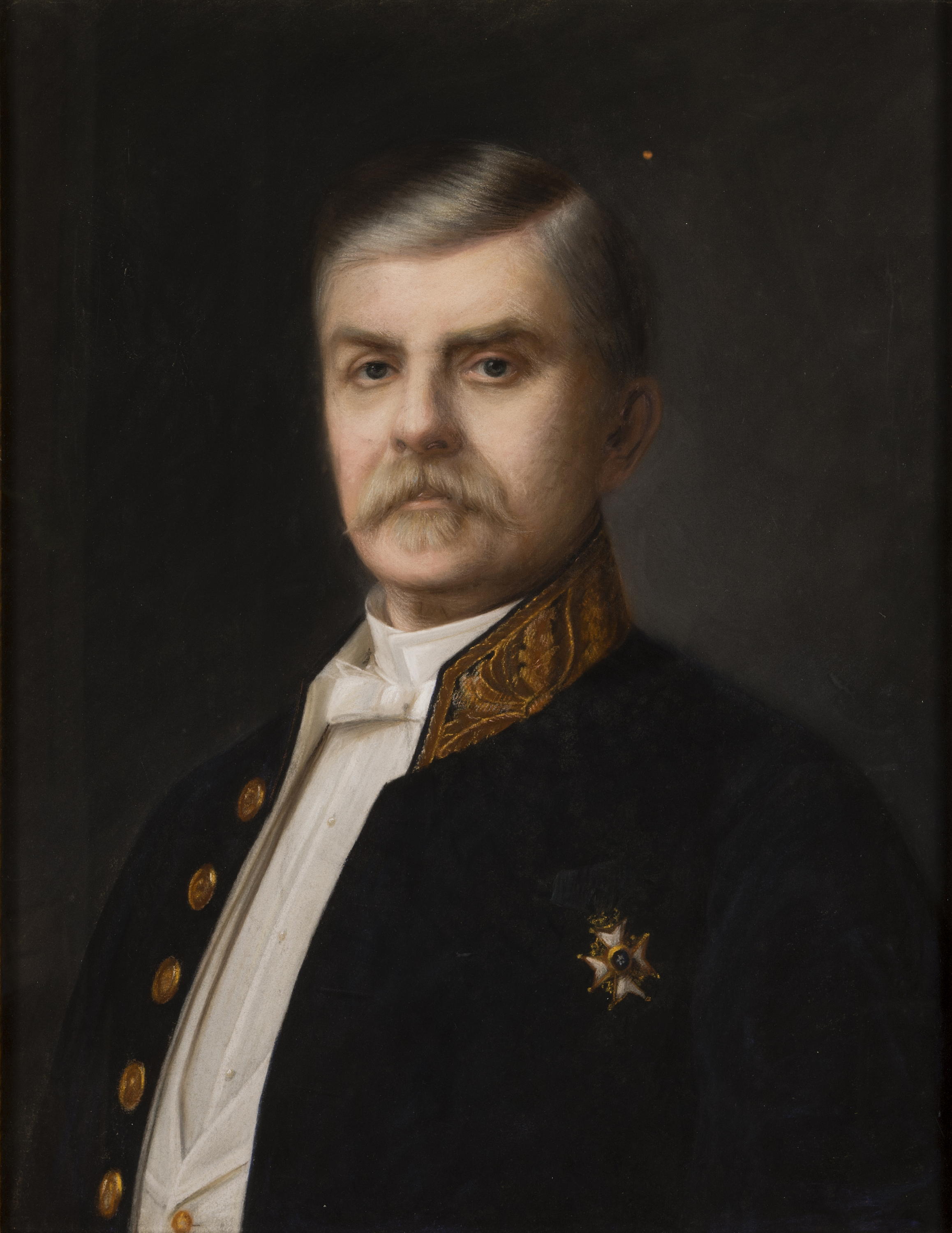 Louis de Geer af Leufsta (1824–1887) iklädd hovuniform samt bärandes på bröstet Nordstjärneorden. Målning av okänt konstnär ca 1870.